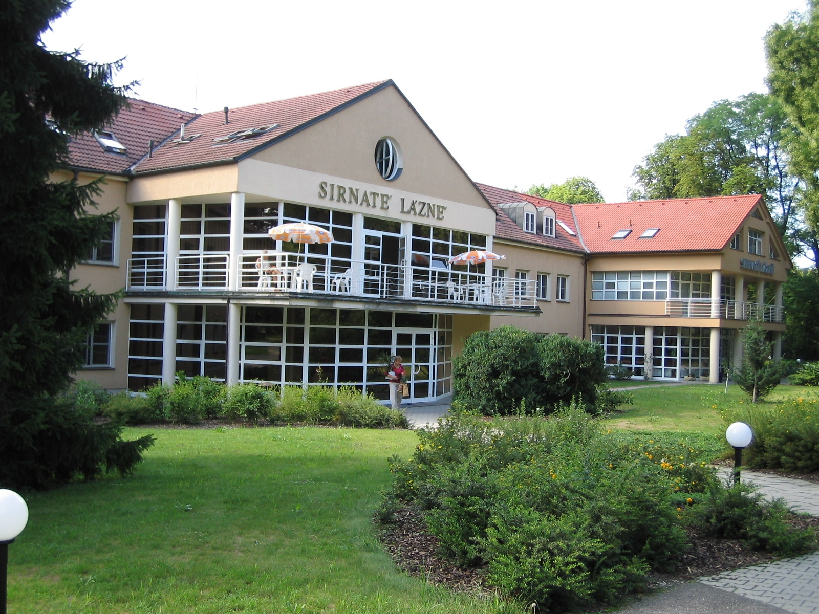 Areál Sirnatých lázní v Ostrožské Nové Vsi